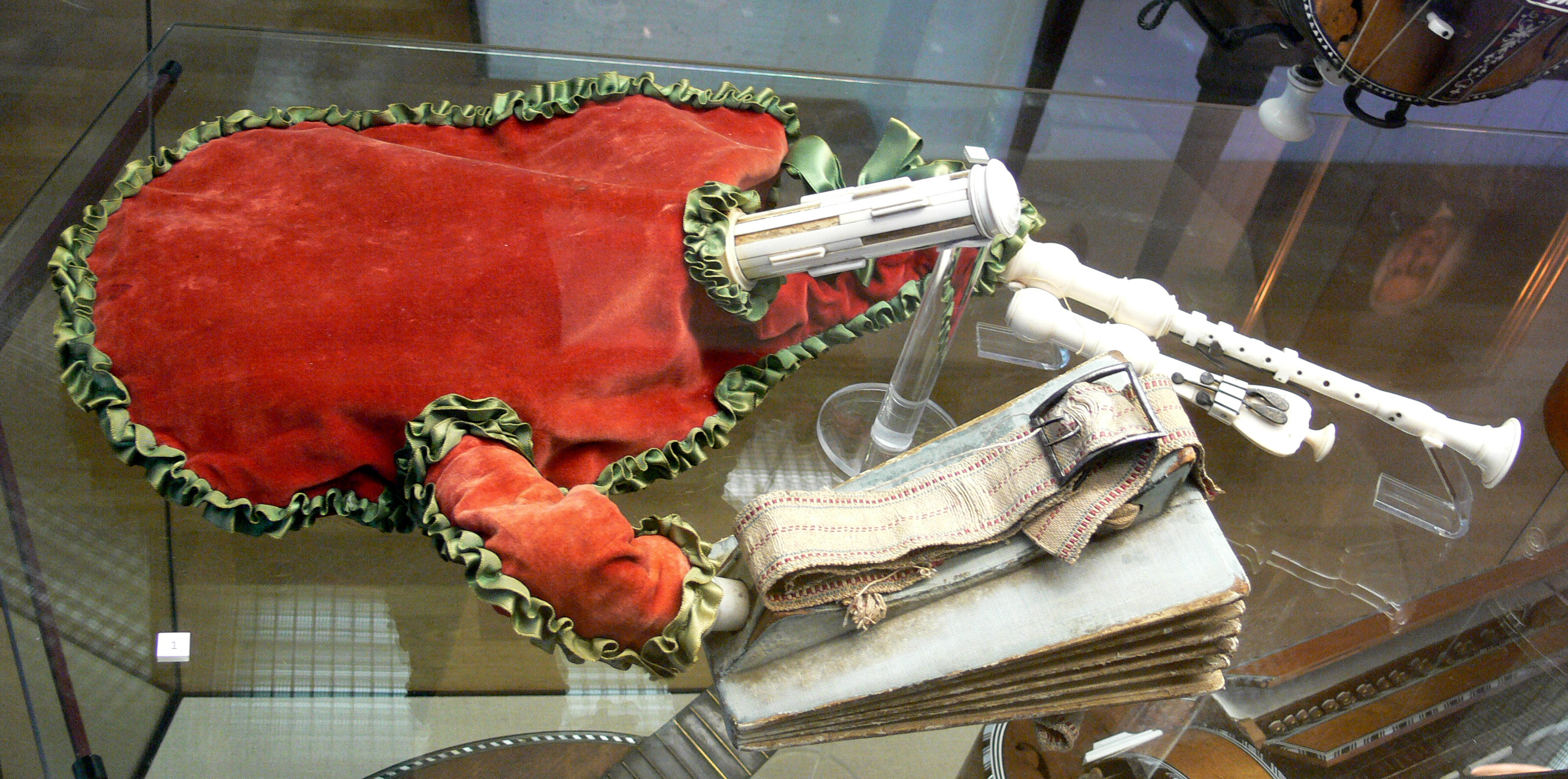 Musette, Frankreich, 17. oder 18. Jahrhundert Musikinstrumentenmuseum Berlin, Kat.-Nr. 5262